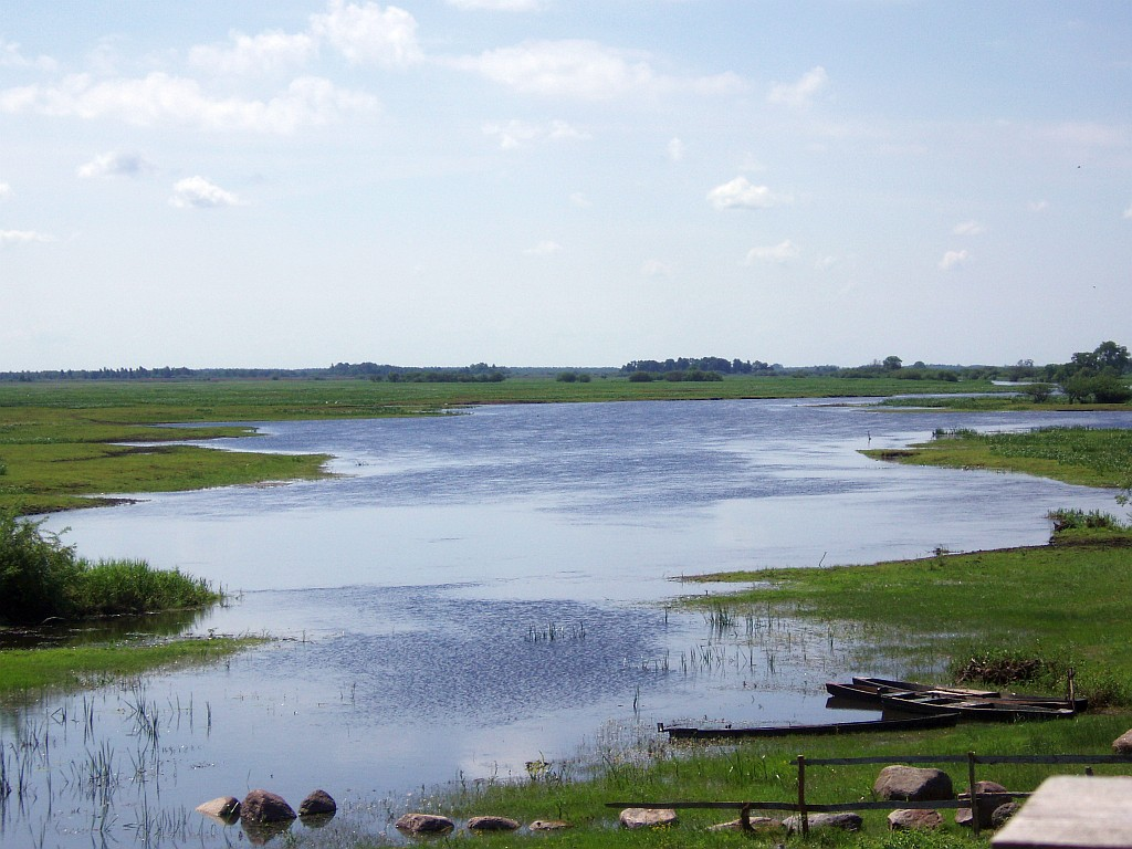 Biebrza we wsi Brzostowo